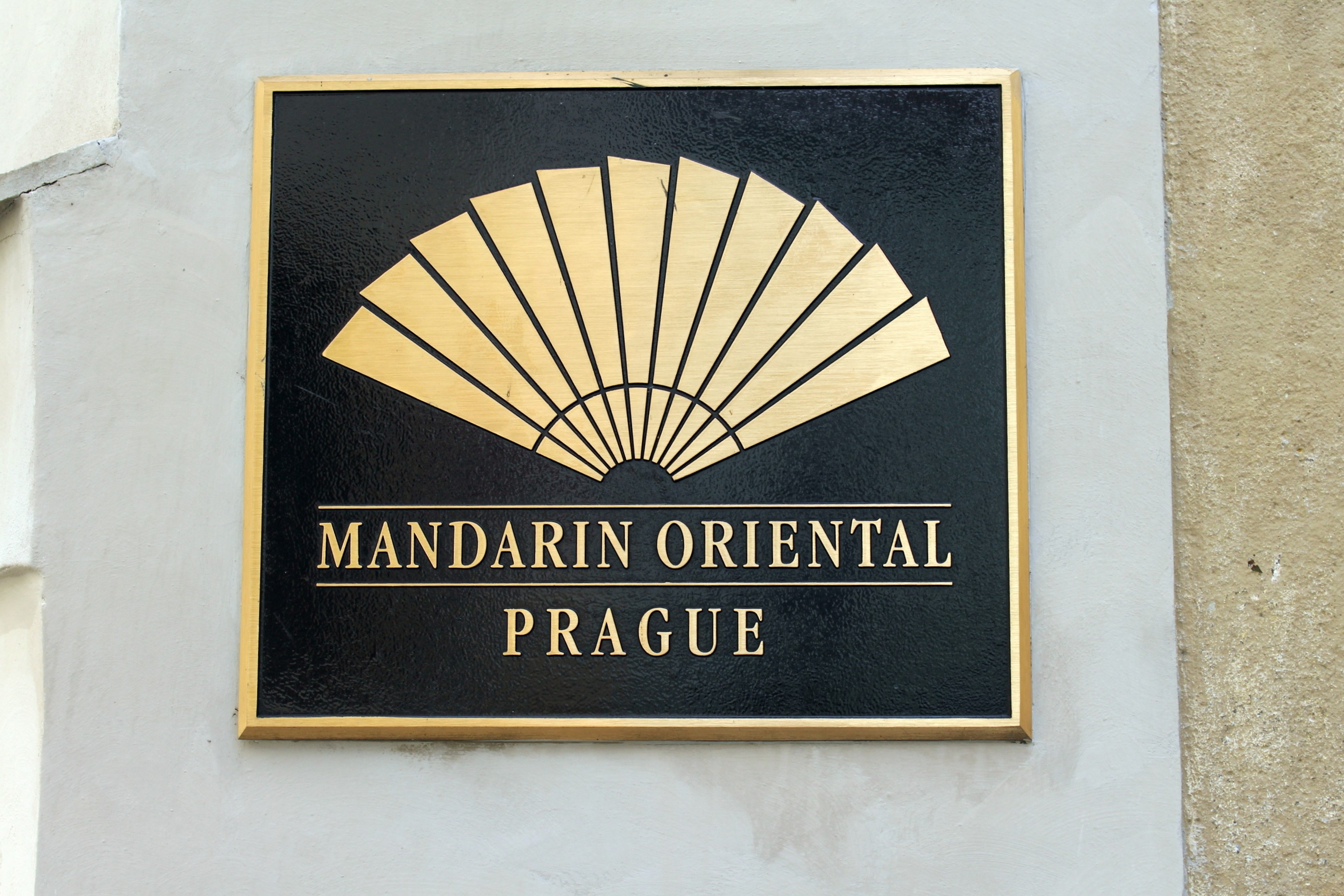 Dominikánský klášter na Malé Straně v Praze